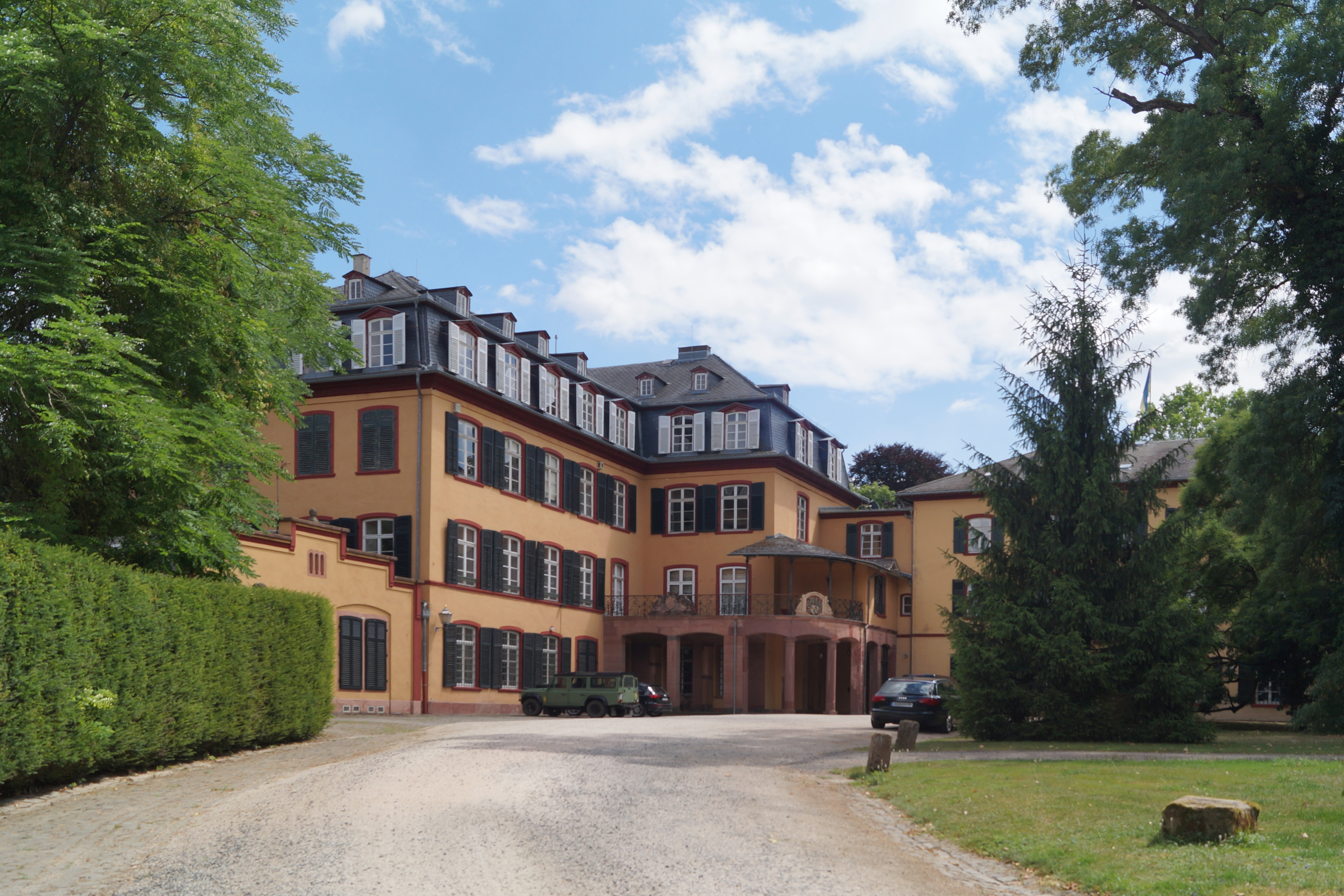 Schloss Assenheim in Niddatal-Assenheim, Wetteraukreis, Hessen. Ansicht des Hauptgebäudes von Nordwesten 2015.